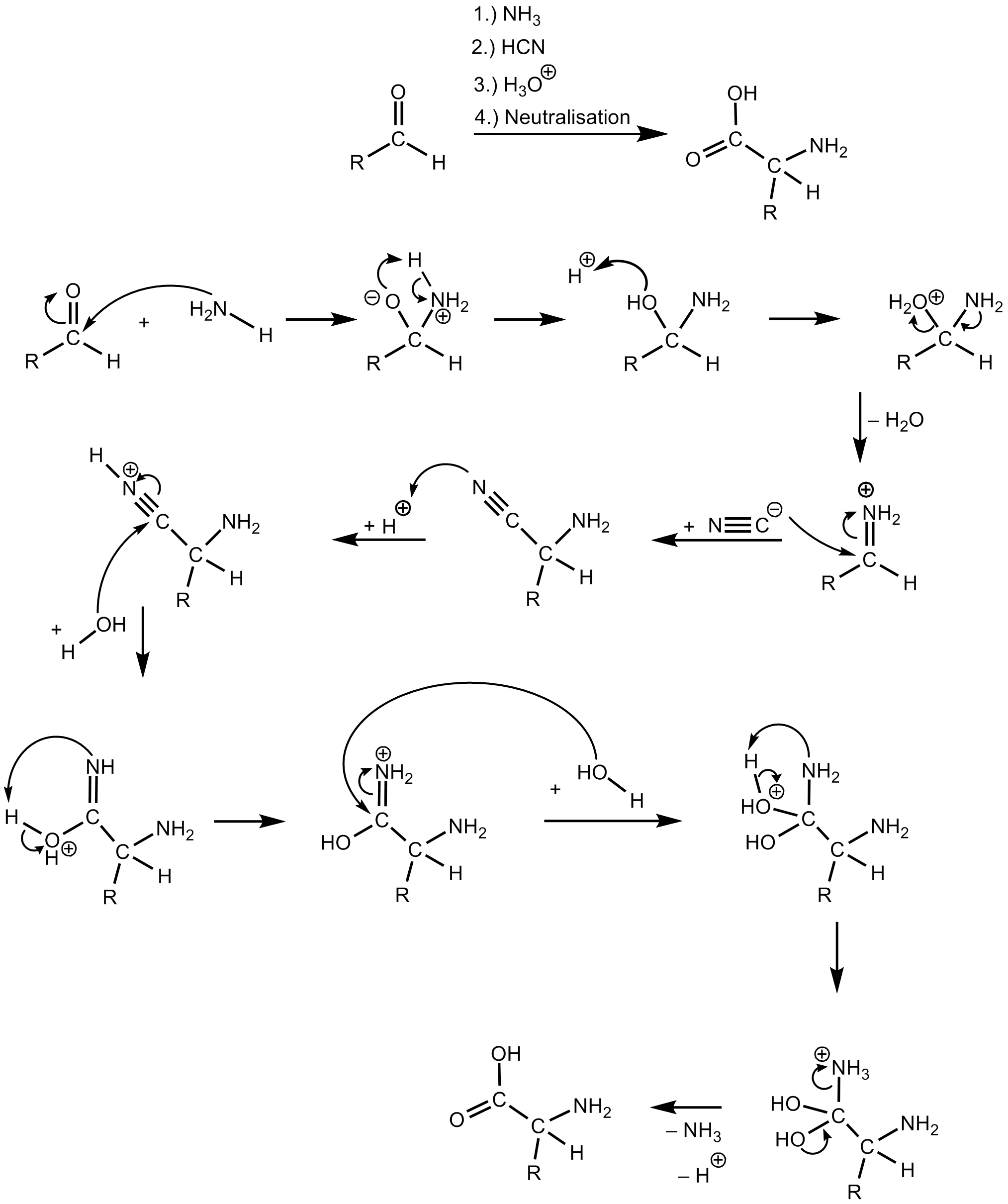 Strecker-Synthese